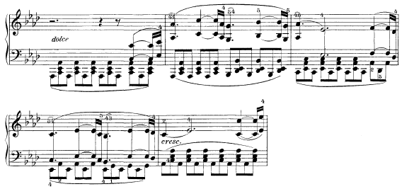 Takt 34 bis 38 von Beethovens op. 57